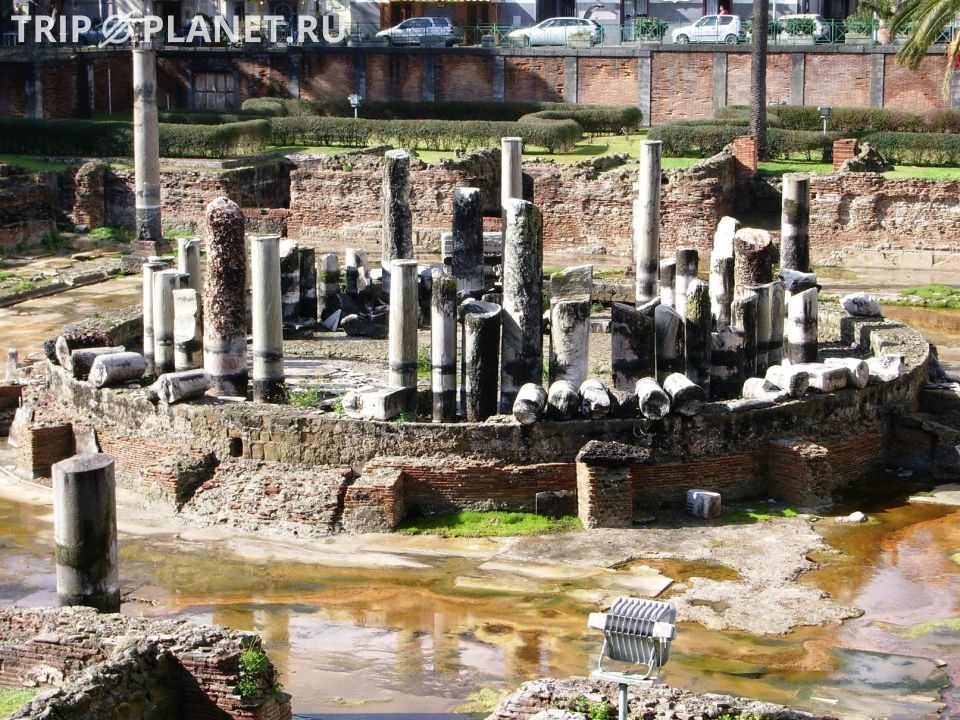 Serapis məbədi